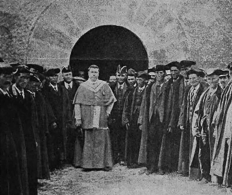 Regent Don Juan Benlloch wraz z członkami parlamentu Andorry (1907)